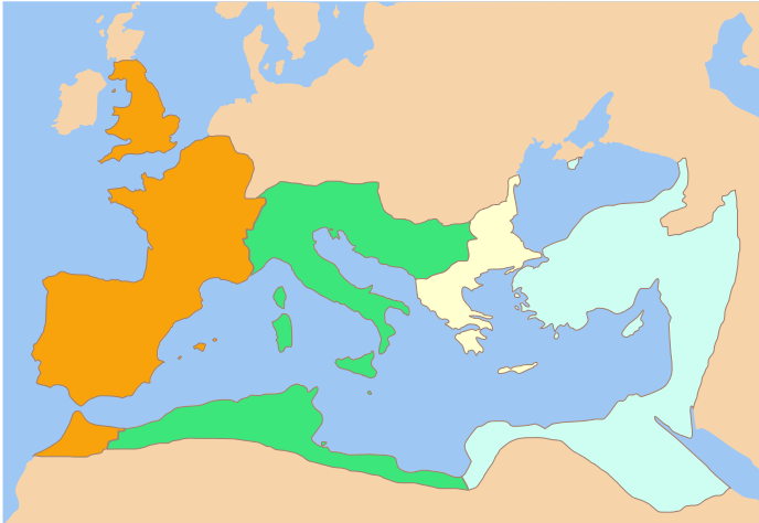 Suddivisione dell'impero romano dal 22 maggio 337 (morte di Costantino I) al 9 settembre dello stesso anno (proclamazione degli augusti). Costantino II Costante I Flavio Dalmazio Costanzo II Per modificare questa immagine, si prega di modificare prima 60px